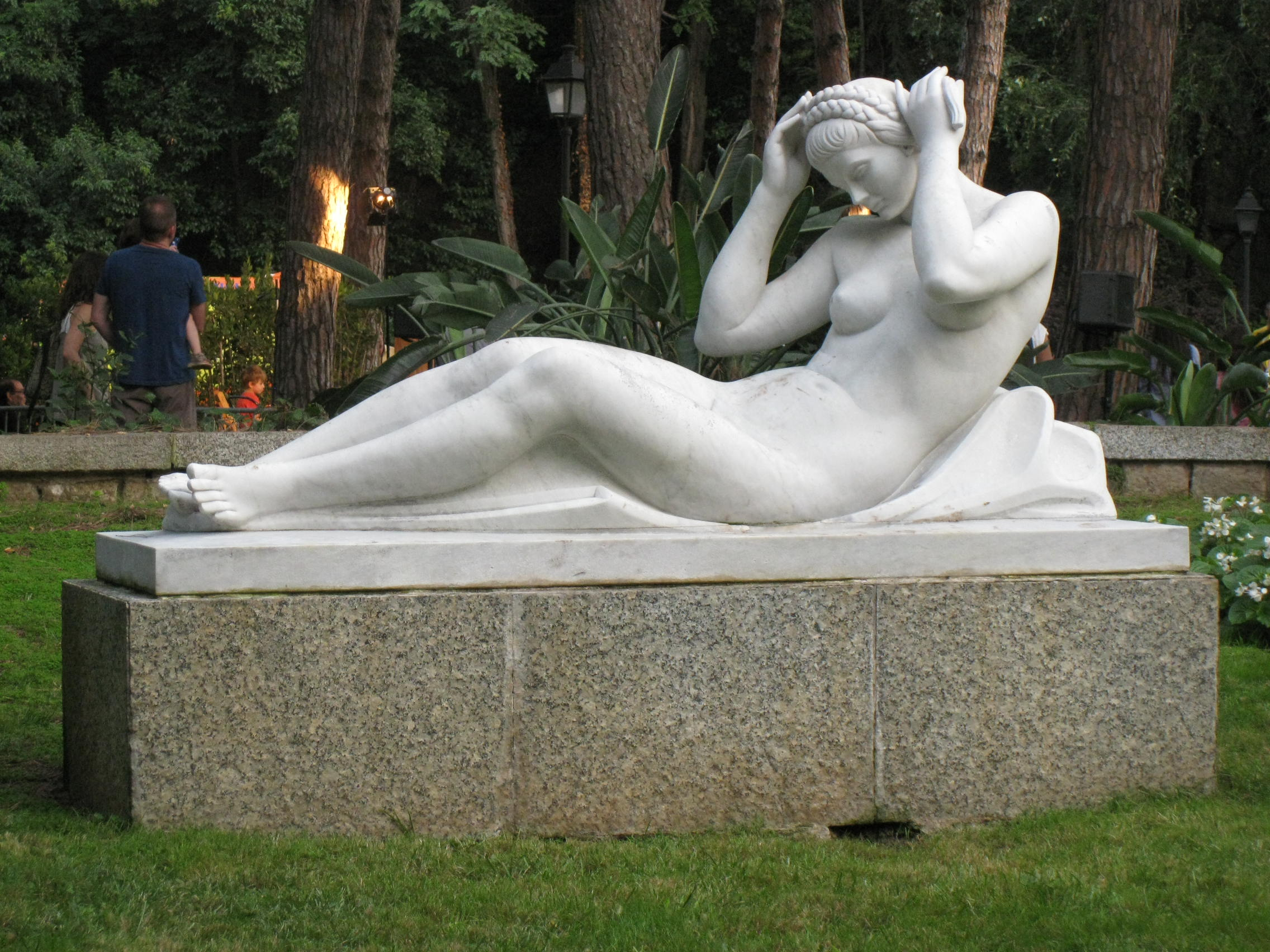 Dona ajaguda (Enric Monjo). Jardins Joan Maragall (Barcelona)